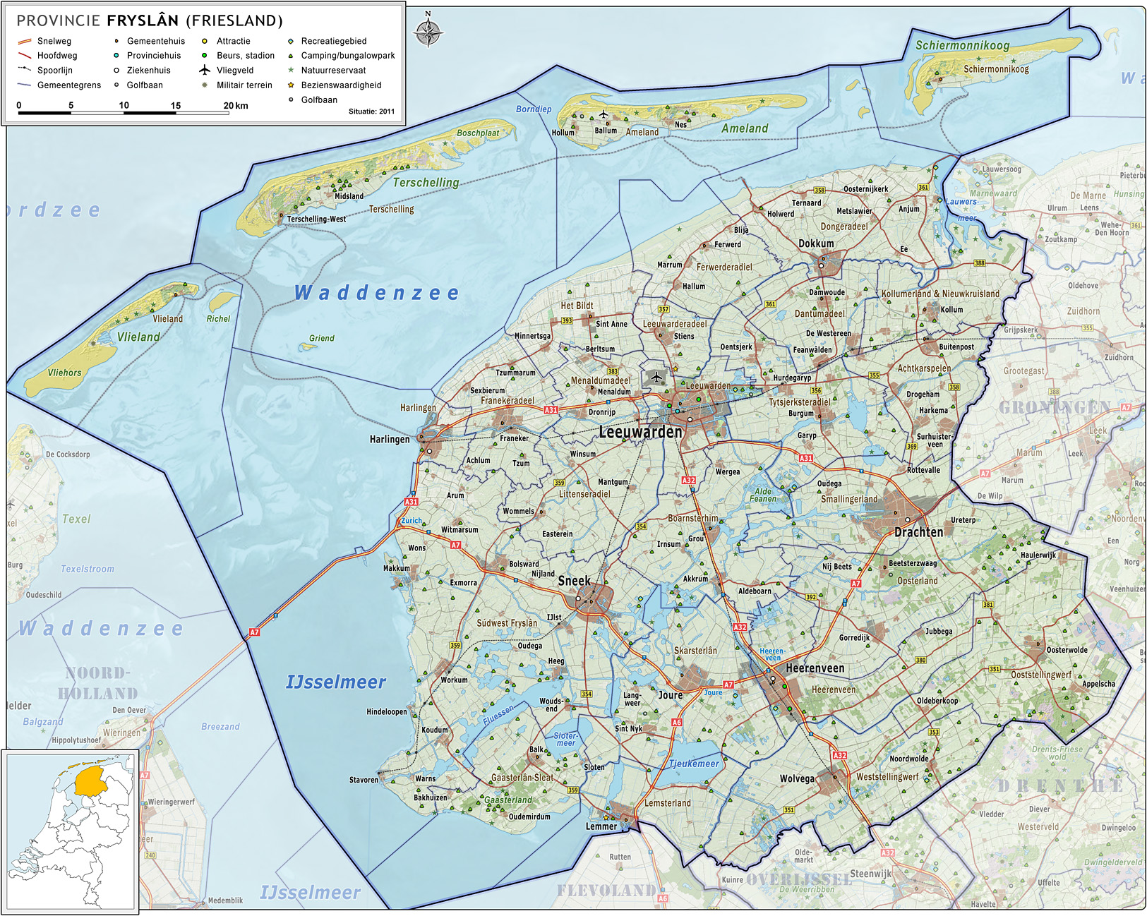 Provincie Fryslân (Friesland), met indeling van gemeenten (2011) en impressie van het landschap. Door Jan-Willem van Aalst, samengesteld uit publiek beschikbare geo-data: Referentie-ondergrond (kustlijn, steden, wegen) gerasterd uit de OpenStreet Map OSM. ( Inhoud is beschikbaar onder de Creative Commons Attribution-ShareAlike 3.0 license. Referentie-ondergrond op water bewerkt vanuit Gebruik is vrij met bronvermelding NLR en ESA. Vectorgrenzen van gemeenten en regio's vrij ter beschikking gesteld met dank aan cartografen van brandweerregio's Hollands-Midden en IJsselland; gerasterd in Photoshop. Hoogte-aanduidingen (reliëf) gerasterd uit de AHN Viewer ( gebruik is vrij met bronvermelding (c) AHN, Locaties verblijfsrecreatie (campings) op basis van Borisweb ( van Kenniscentrum recreatie. Gebruik is vrij, met bronvermelding. Overige kenmerken op de kaart: eigen tekenwerk van Jan-Willem van Aalst, op basis van gerasterde gemeentegrenzen.